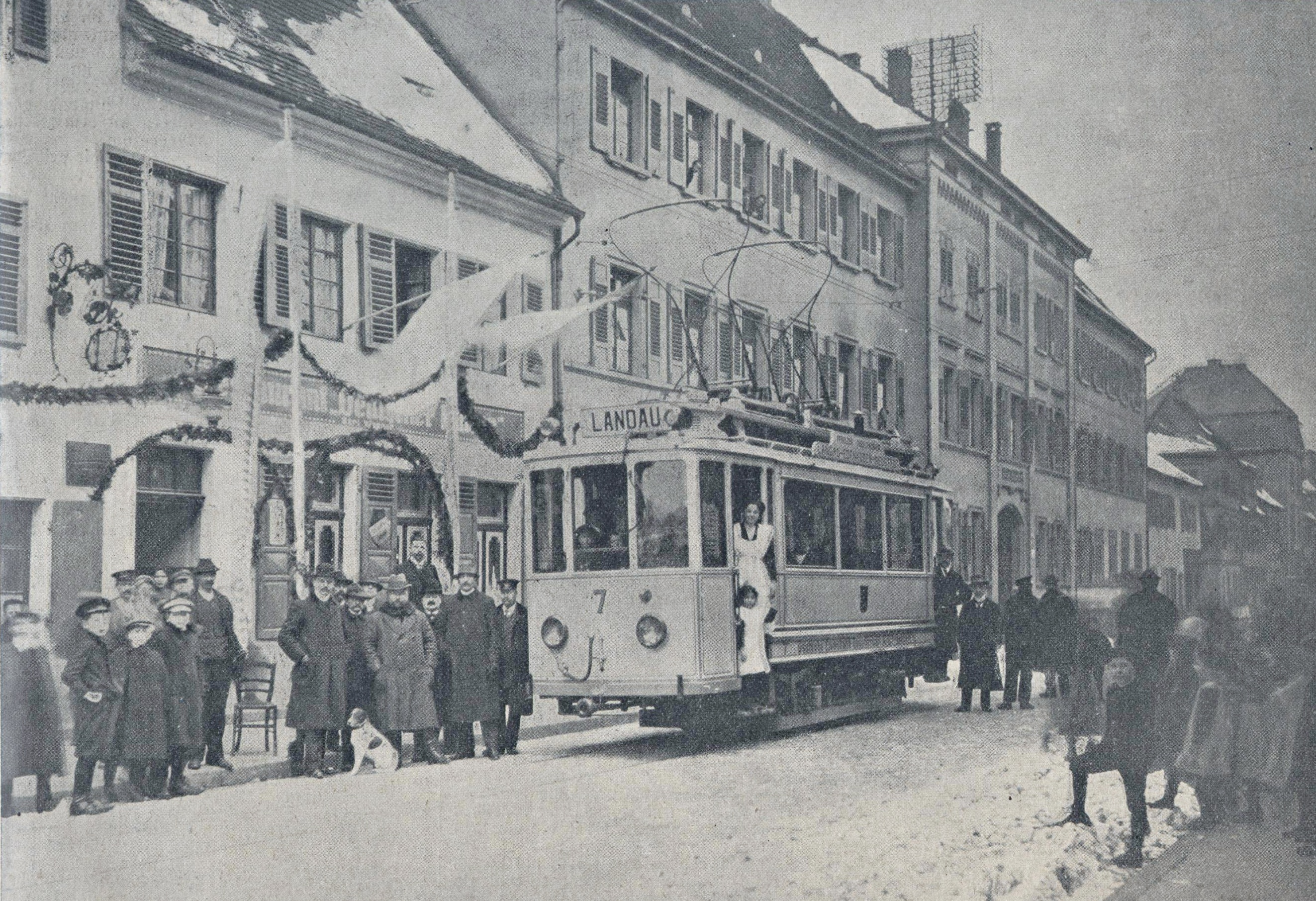 Die Pfälzer Oberlandbahn am Tag der Eröffnung in der Königstraße, Landau, 11.1.1913